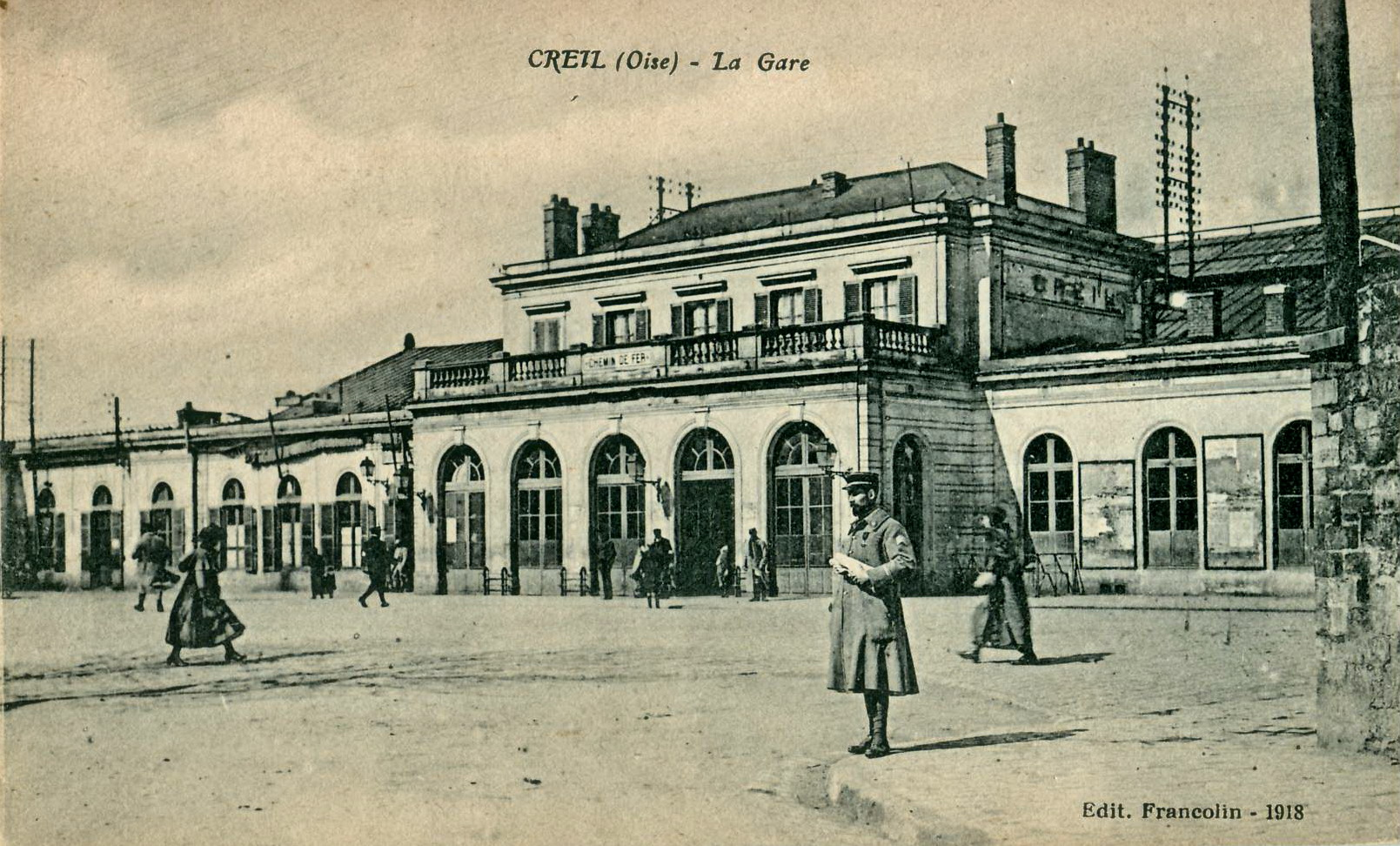 Carte postale ancienne éditée par FrancolinCREIL : la Gare